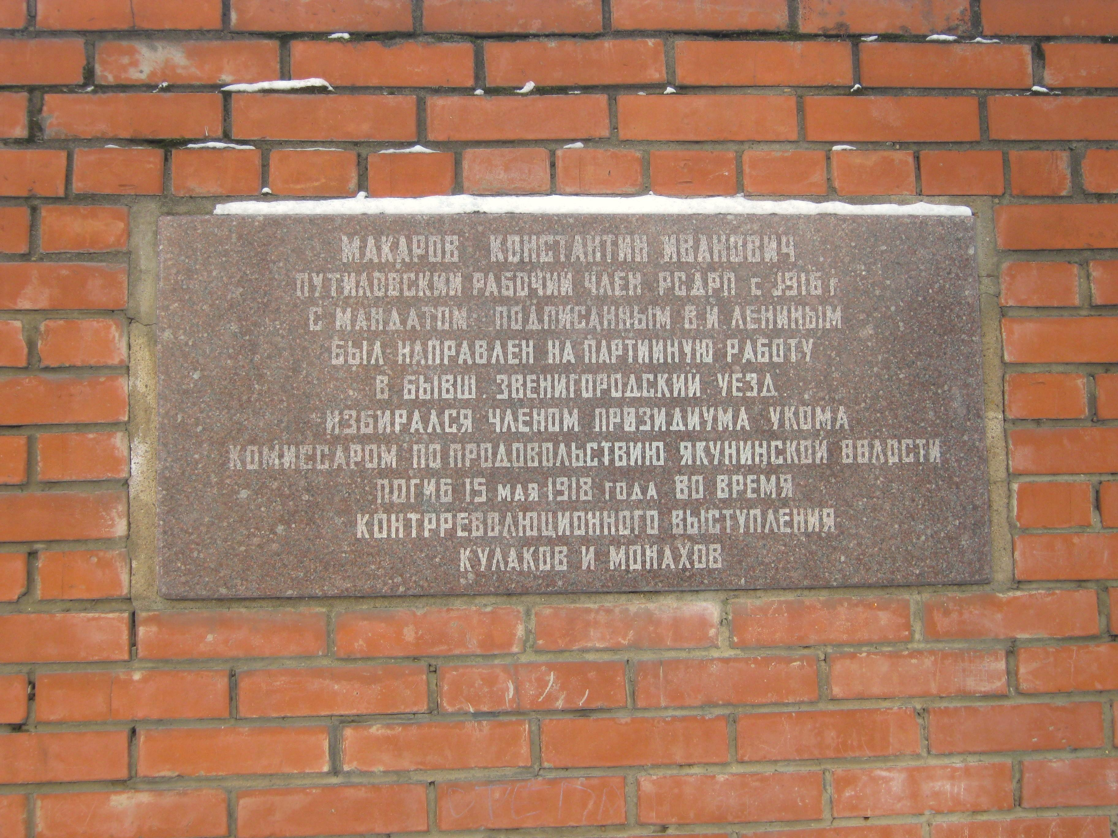 Мемориальная доска на улице Макарова в Звенигороде